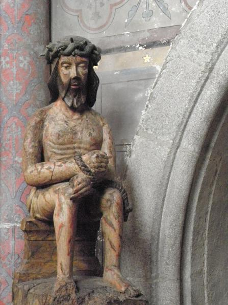 Statue du Christ aux Outrages de la Cathédrale Saint-Samson de Dol (35)